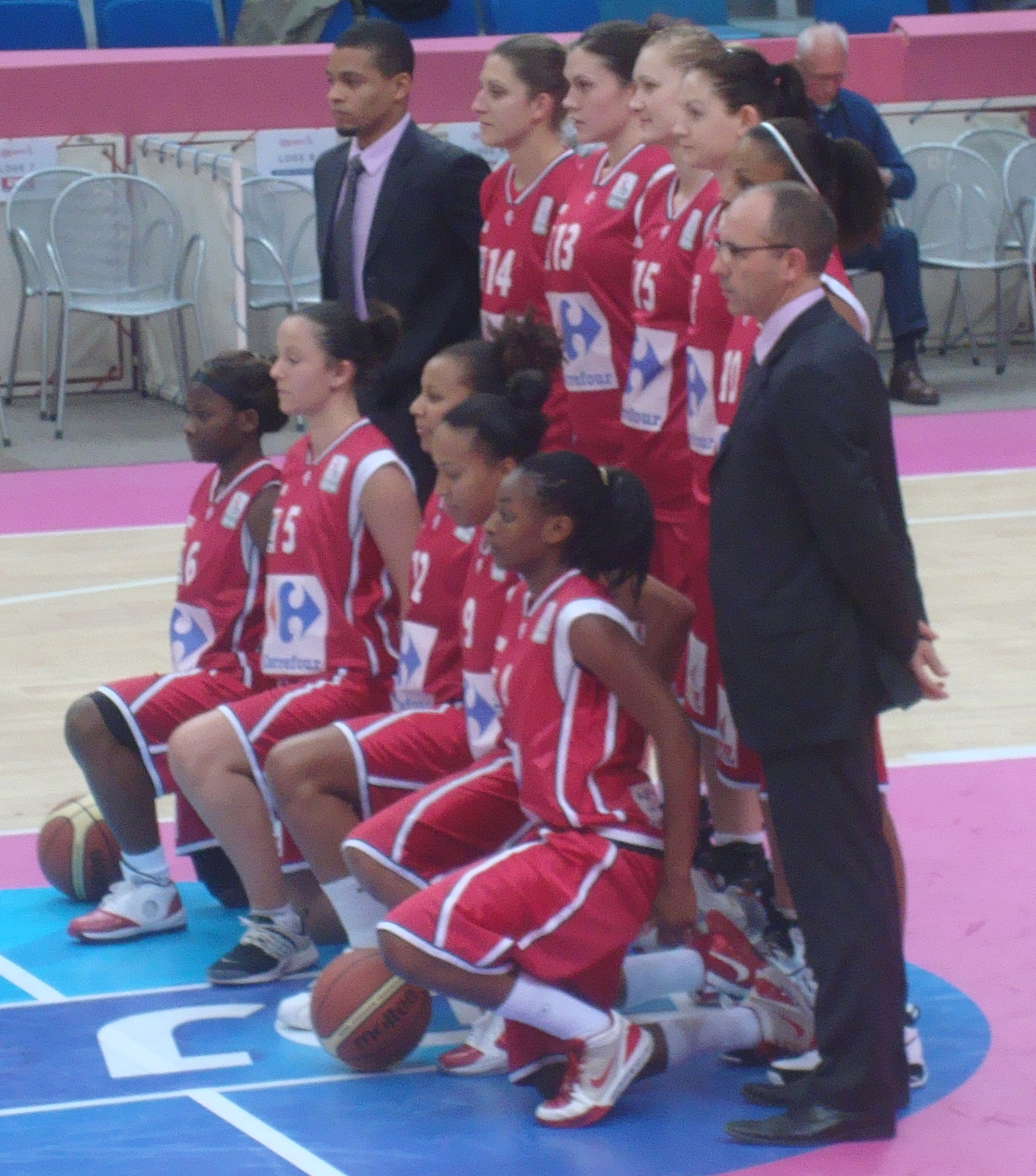 L'équipe de basket féminin de l'USO Mondeville à l'Open LFB